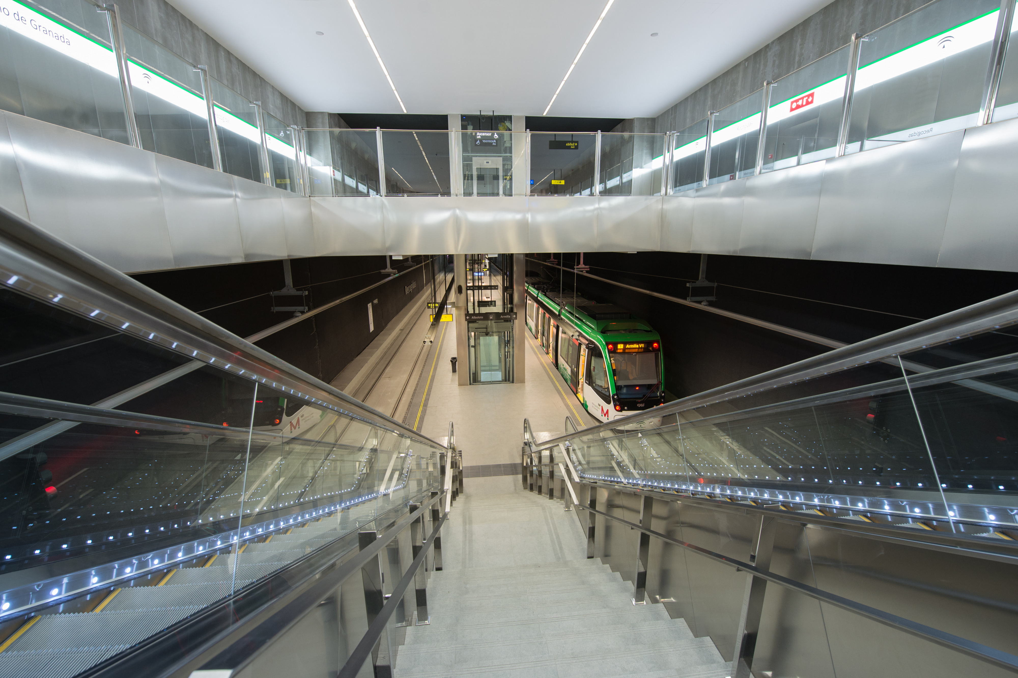 Escaleras y andenes de la estación de Recogidas